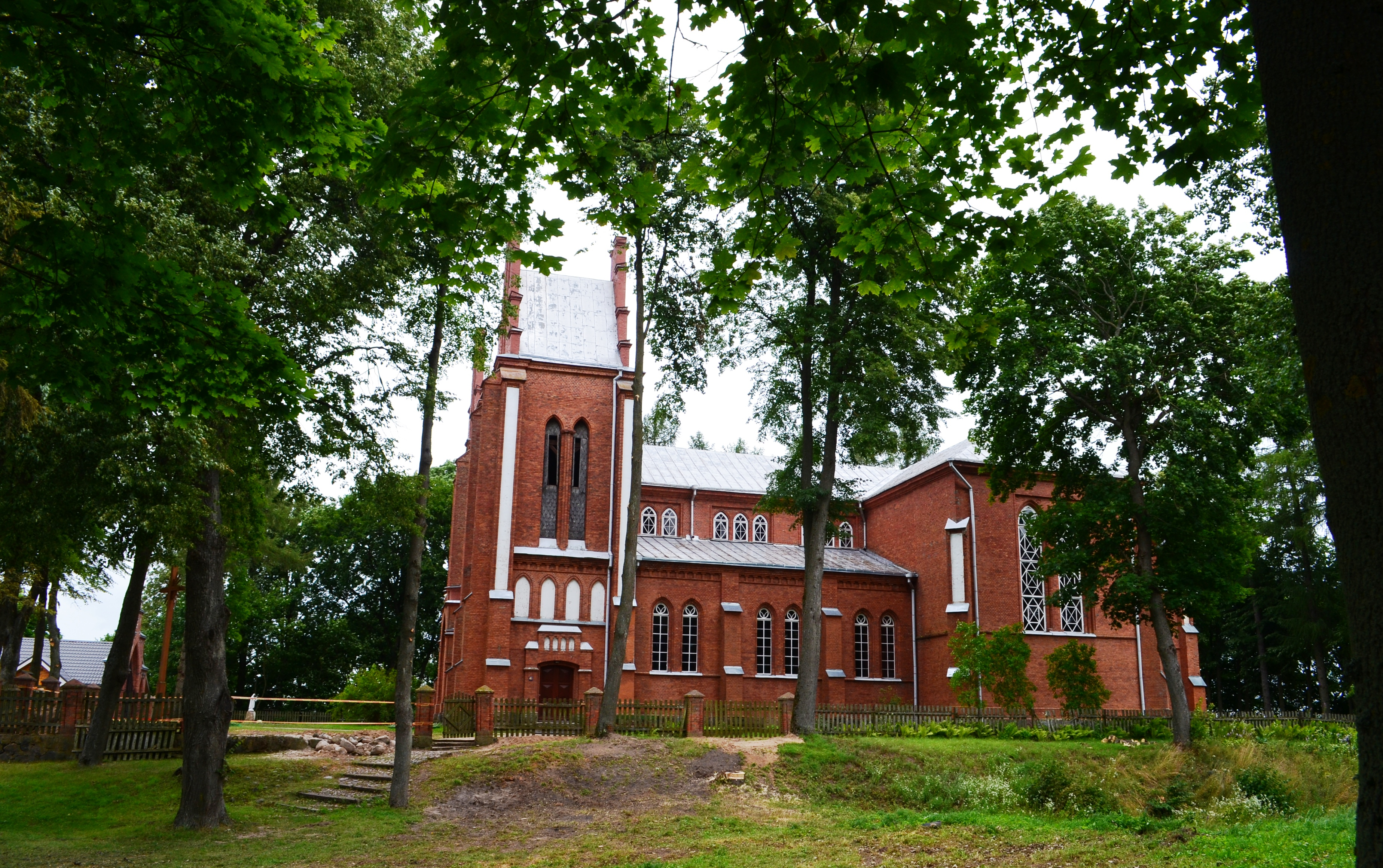 Paberžės bažnyčia, Vilniaus r.